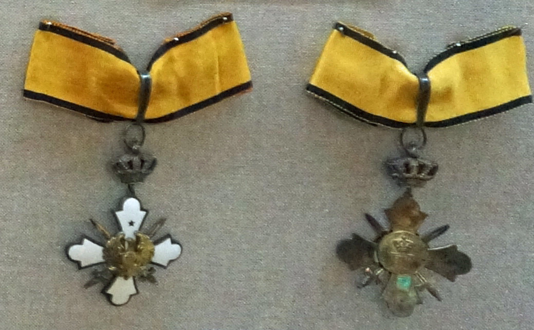 salle des médailles.